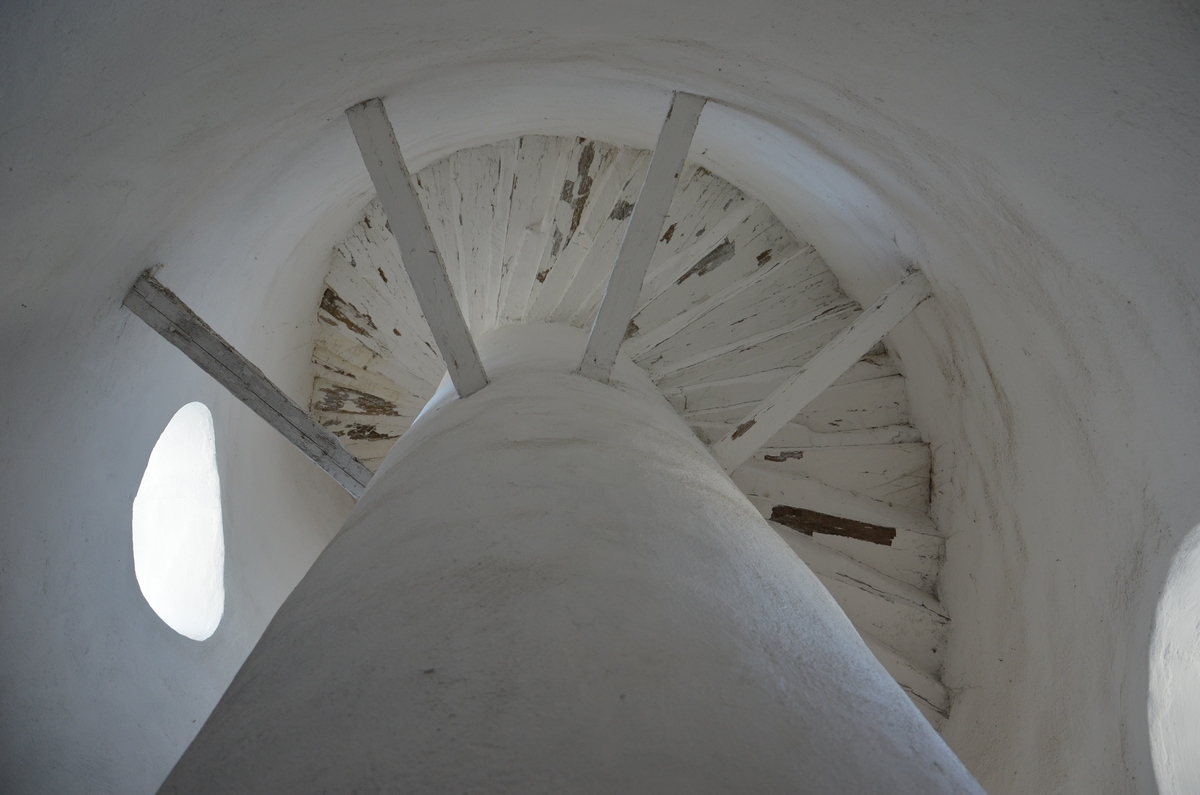 Farul Comisiei Europene a Dunării